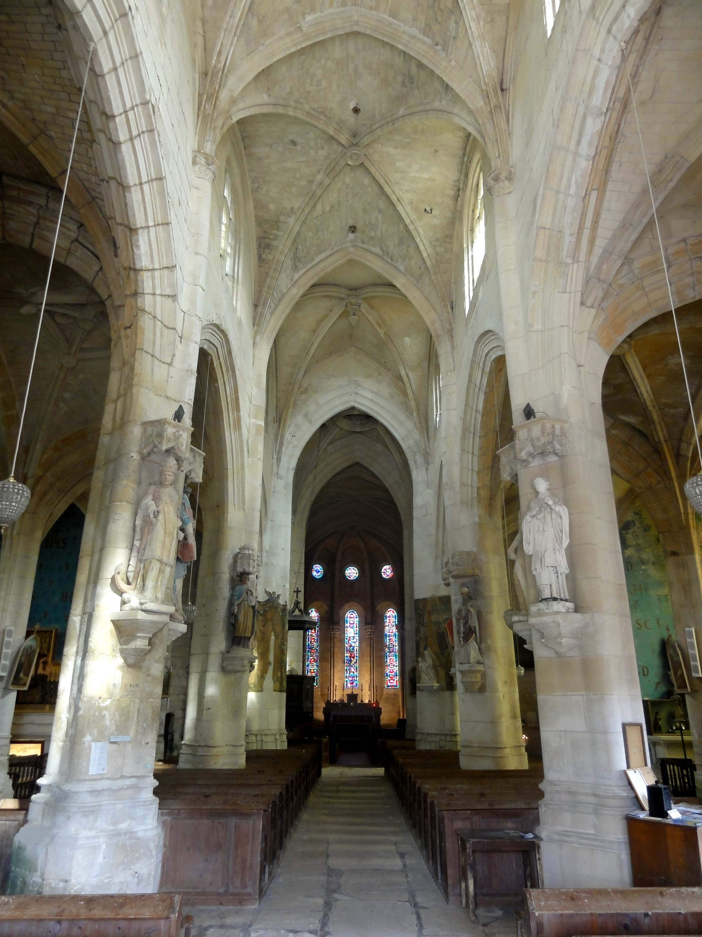 Nef, vue vers l'est.